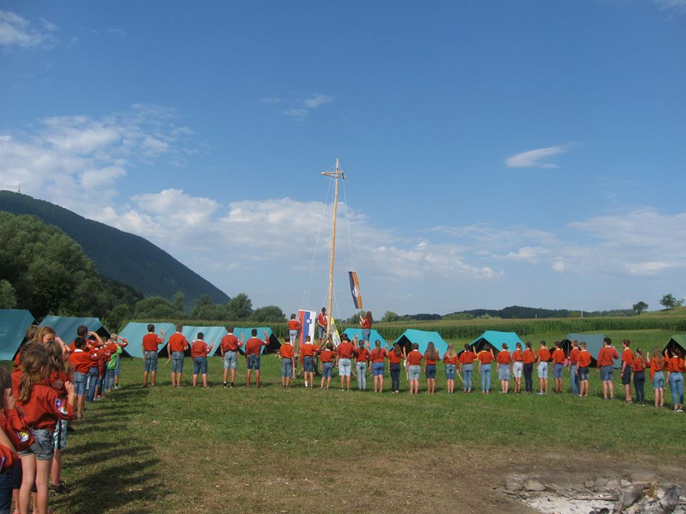 ZSKSS skavtski tabor stega Slovenske Konjice1 2017